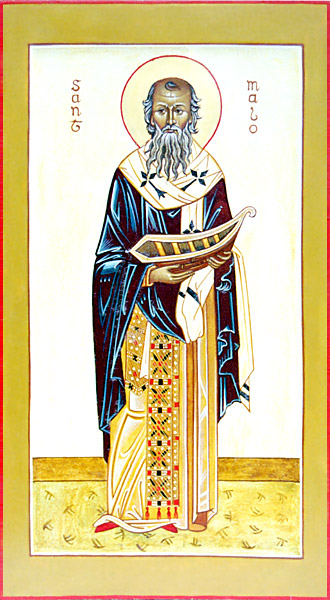 L'icône de St. Malo peinte pour l'Association orthodoxe sainte Anne (Bretagne).